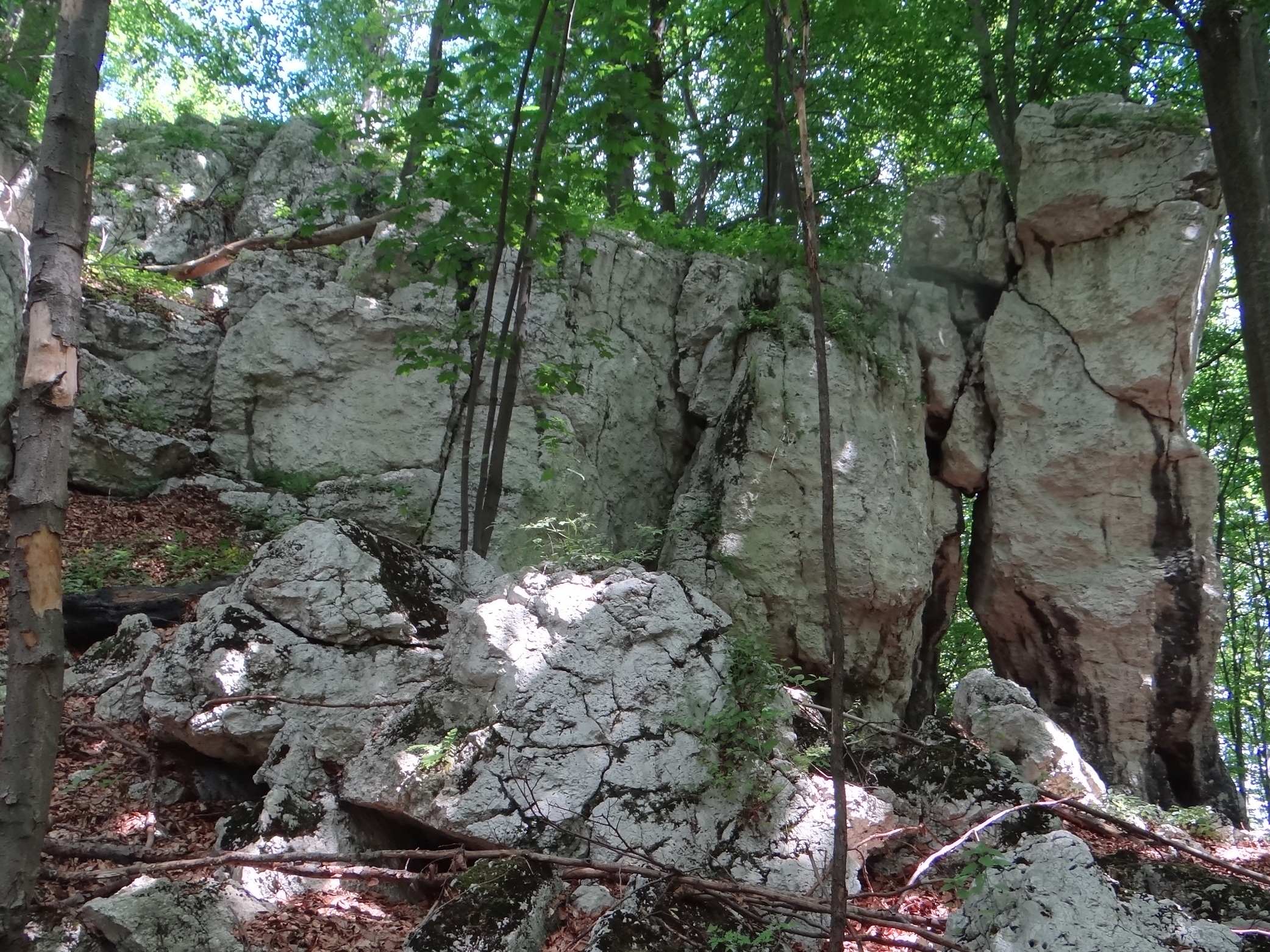 Maniak Zadni na wzgórzu Maniakówka koło Jaroszowca